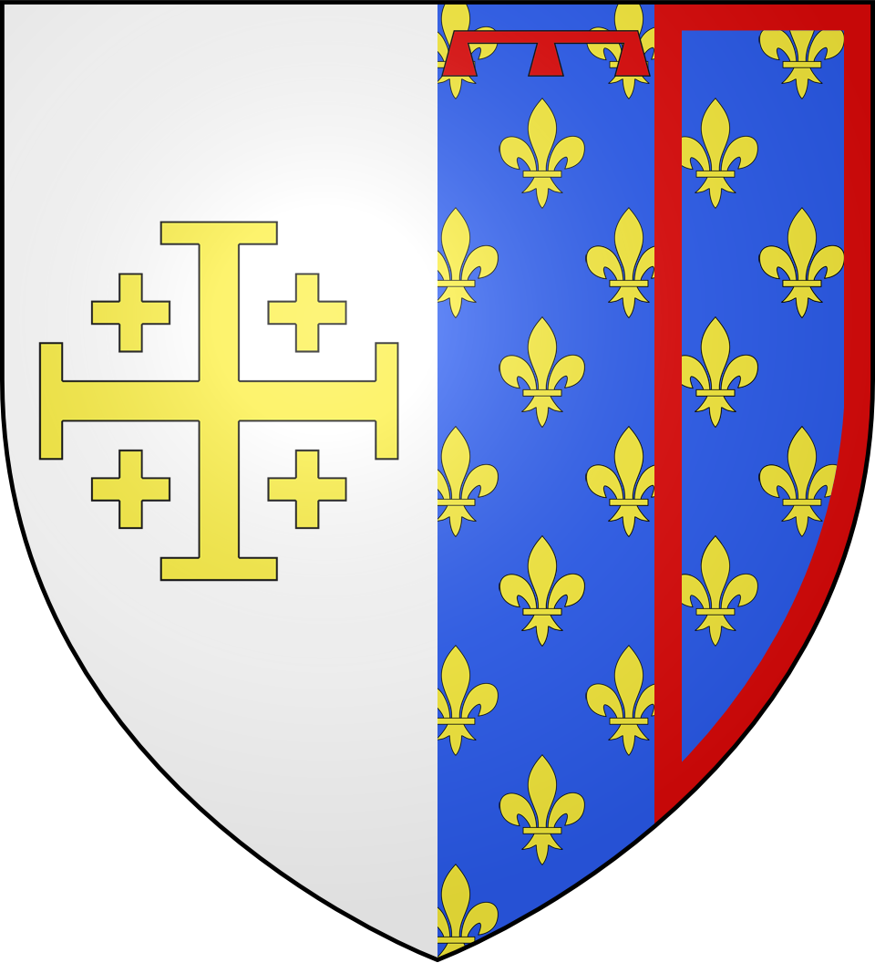 Blason du duché d'Anjou : parti d'argent à la croix potencée d'or, cantonnée de quatre croisettes du même et re-parti d'azur semé de lys d'or et au lambel de gueules et d'azur semé de lys d'or et à la bourdure de gueules